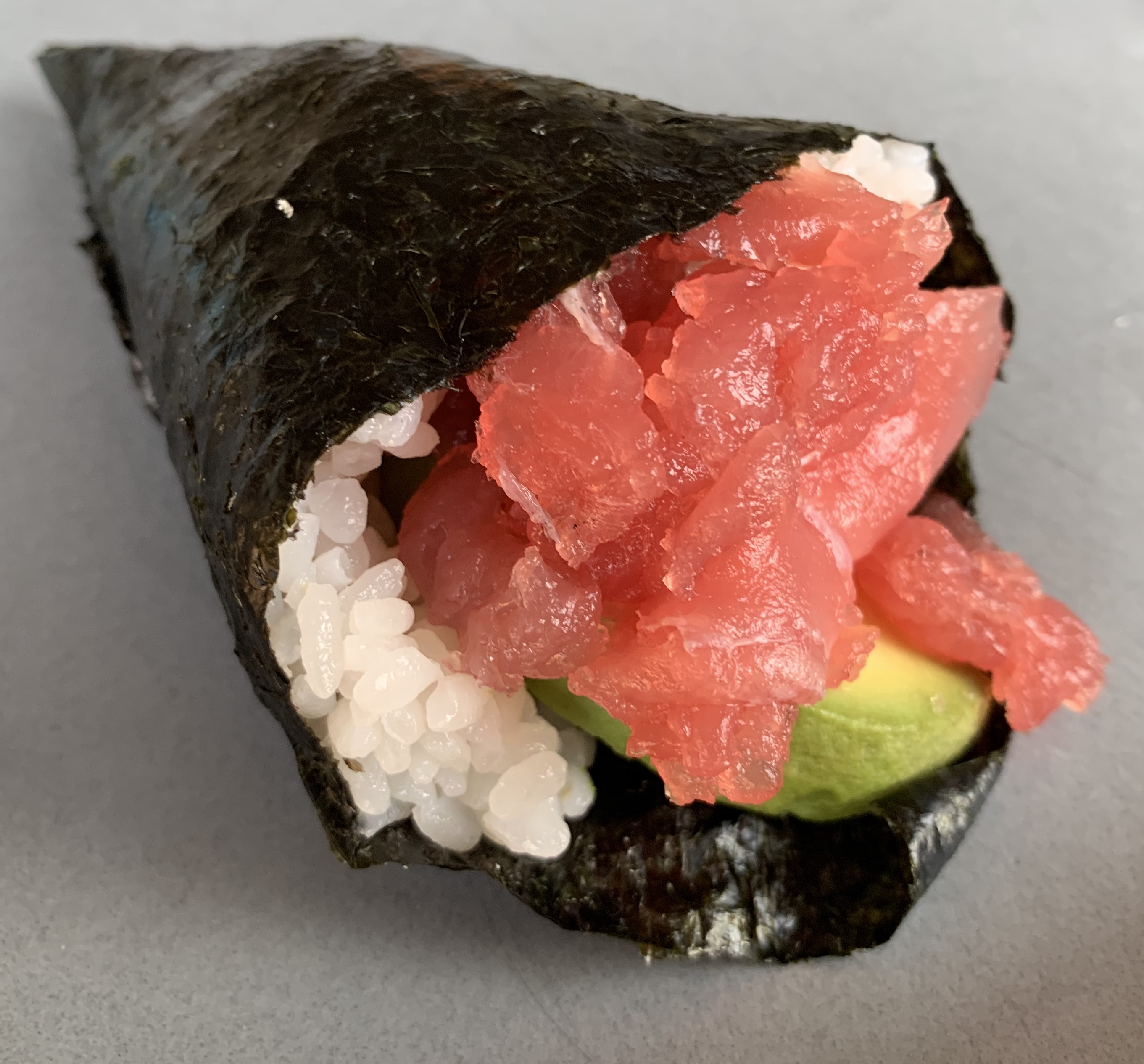 Temaki thon durant le confinement 2020 : livraison par La Perle Sushi à Caluire-et-Cuire.